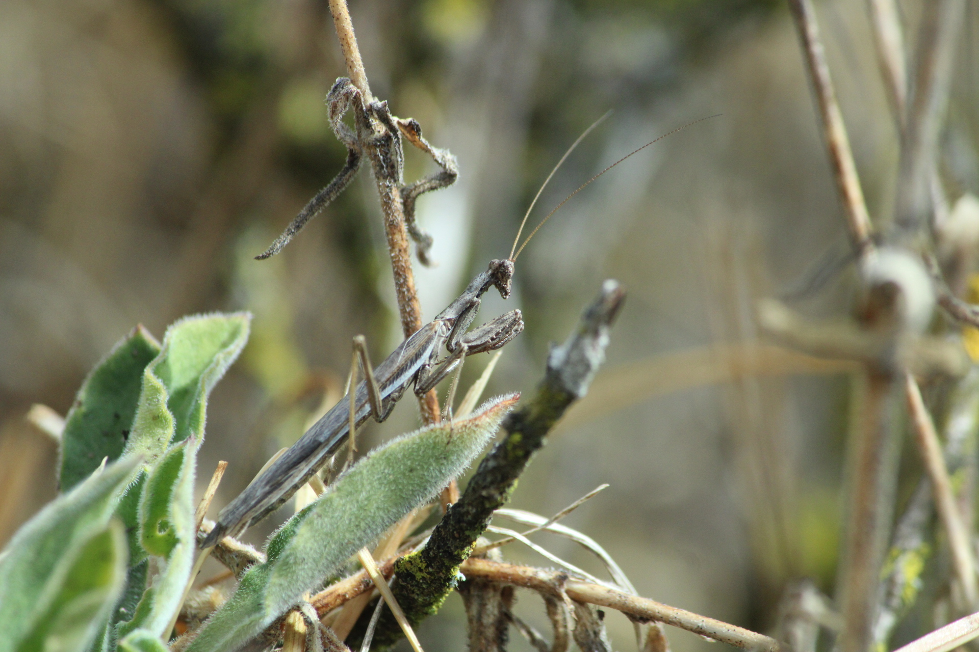 Ameles decolor mâle photographié dans la Drôme